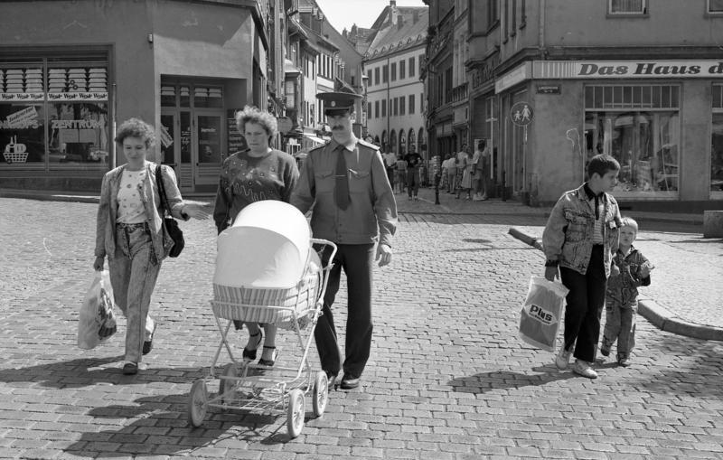 11.-18.8.1991 Bundesland Sachsen-Anhalt Naumburg, sowjetische Familie im Straßenbild